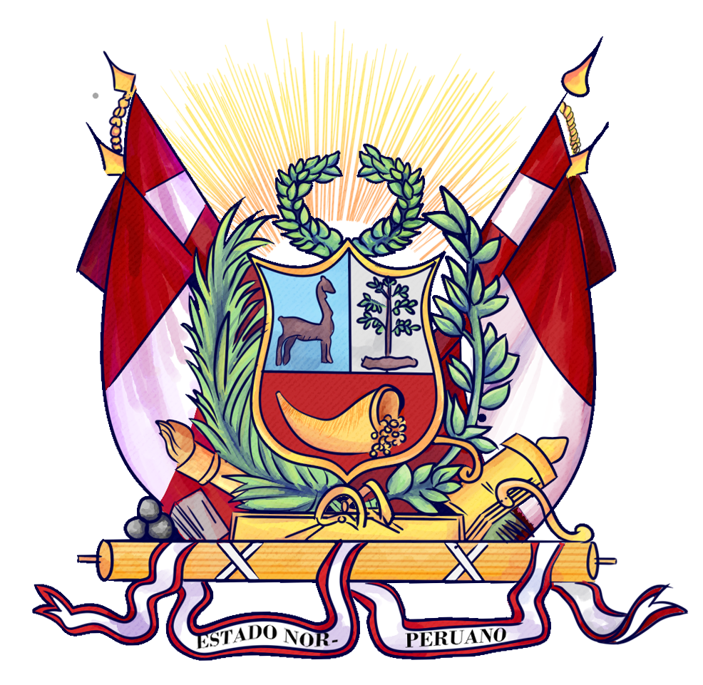 Emblema del Estado Nor Peruano